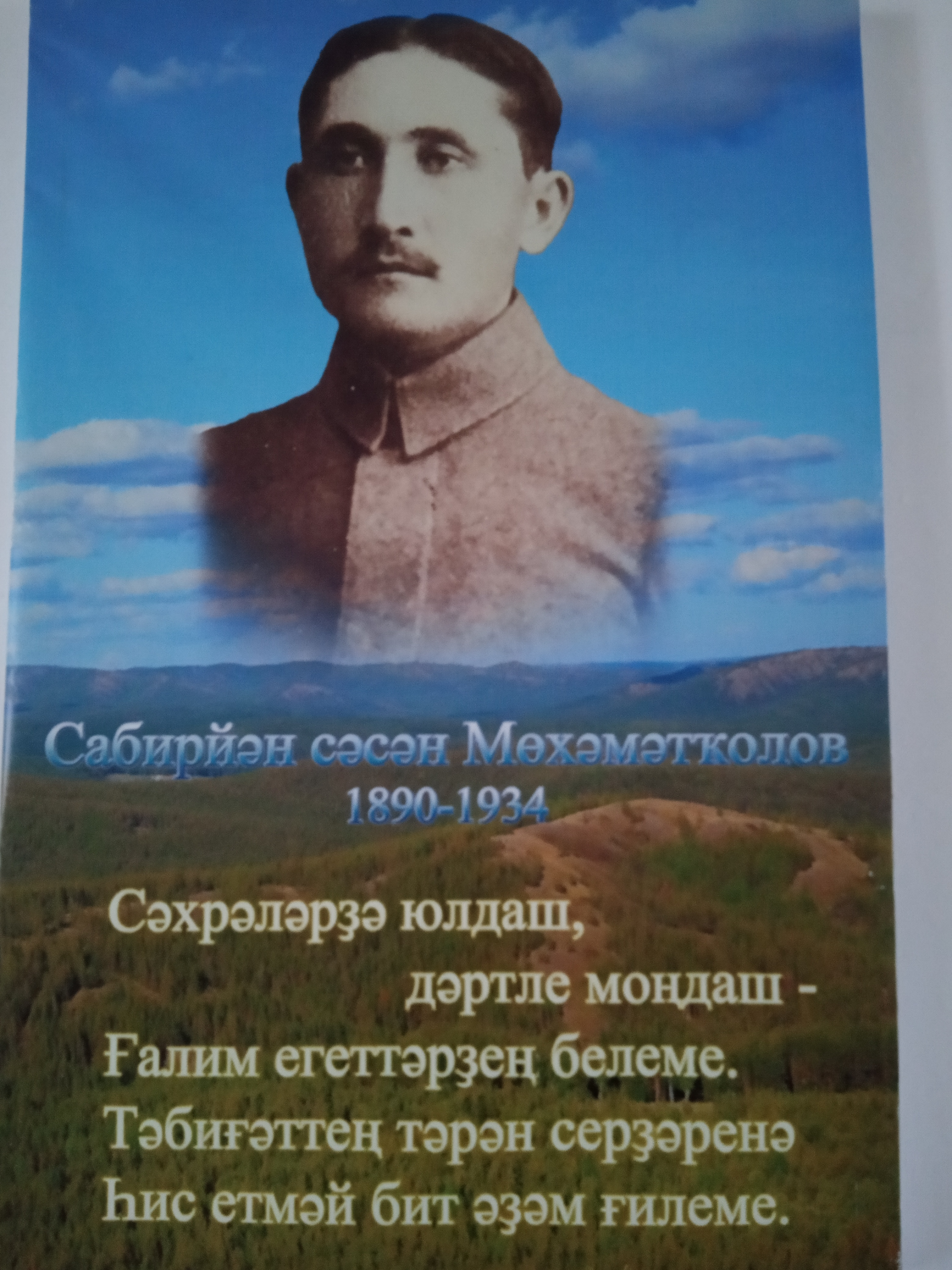 Школьный музей дер.Абдулмамбетово Бурзянского района